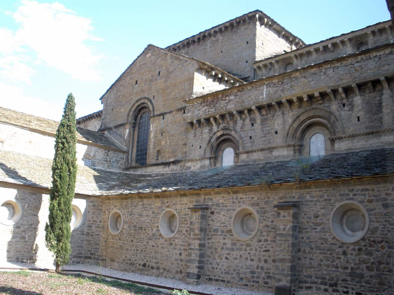 Claustro de la Catedral de Jaca